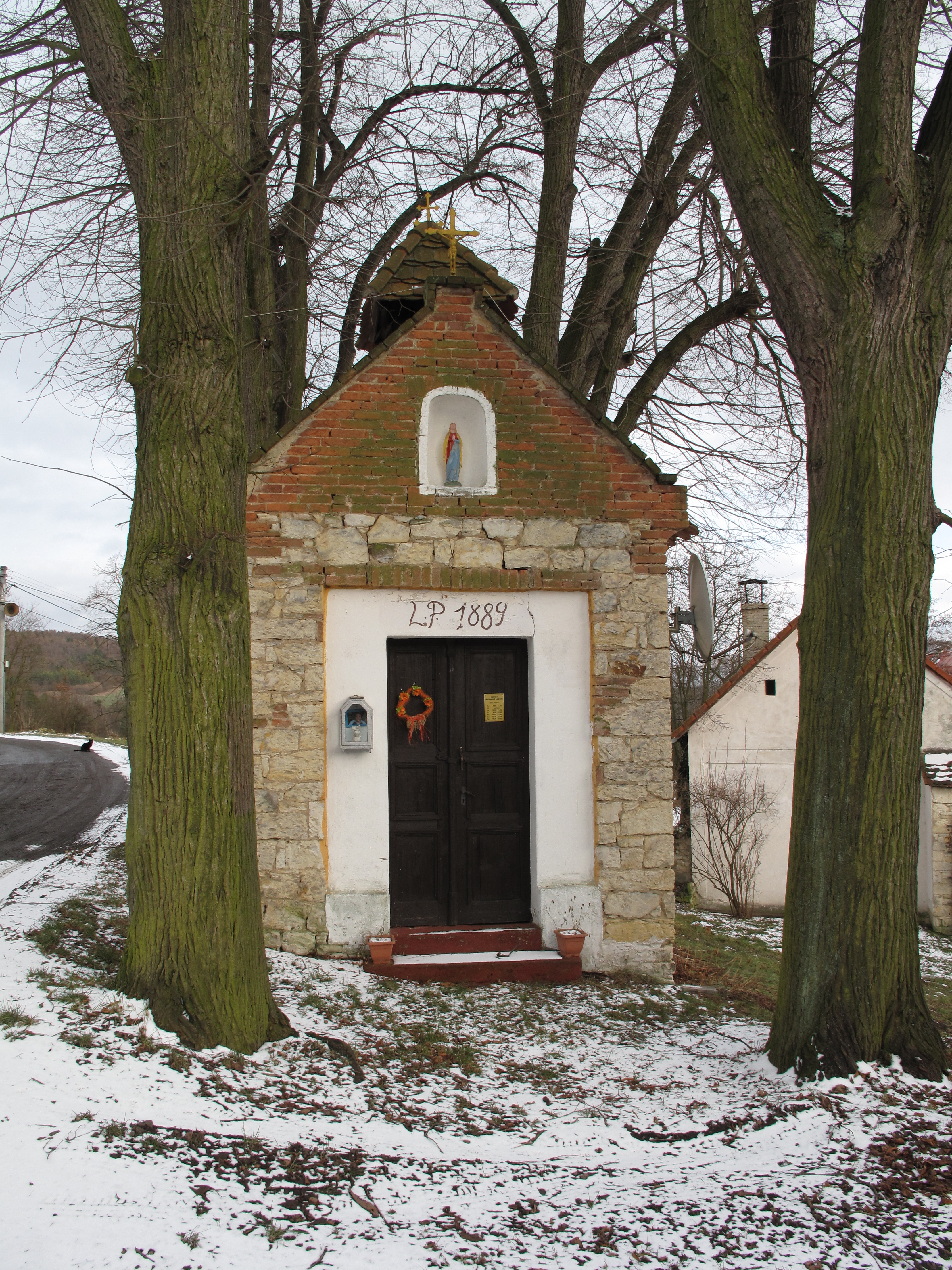 Kaplička v Dučicích. Okres Rakovník, Česká republika.